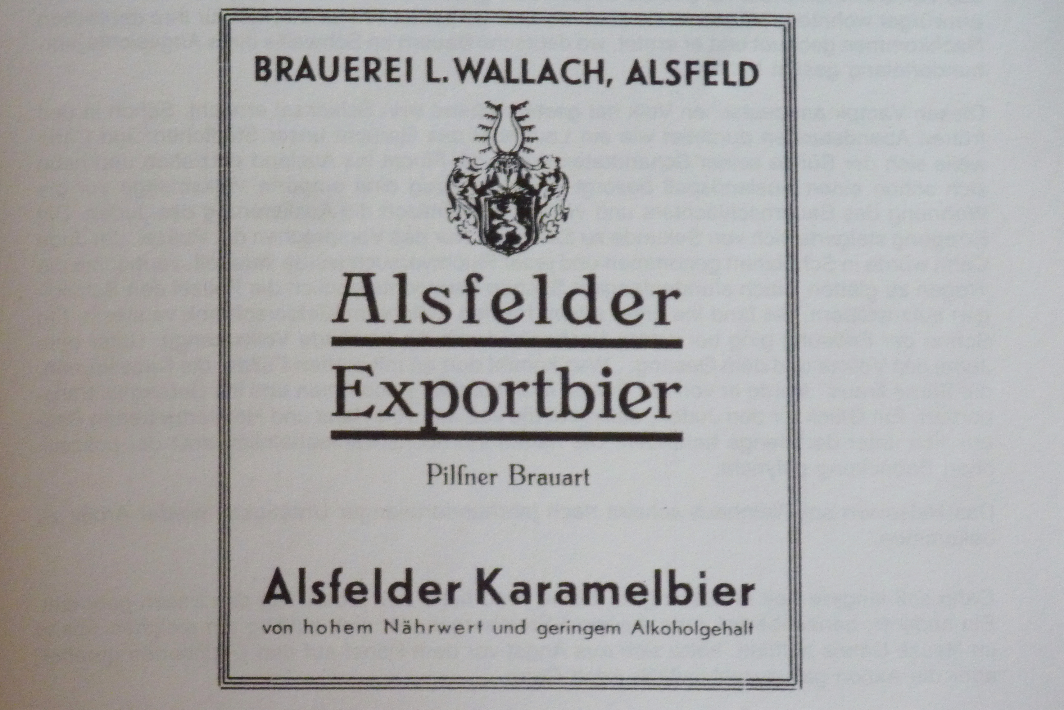 Werbeanzeige der Brauerei Wallach in Heinrich Dittmar/Herbert Jäkel: Geschichte der Juden in Alsfeld. Alsfeld, Geschichts- u. Museumsverein, 1988, S. 107, ISBN 3-927284-00-9